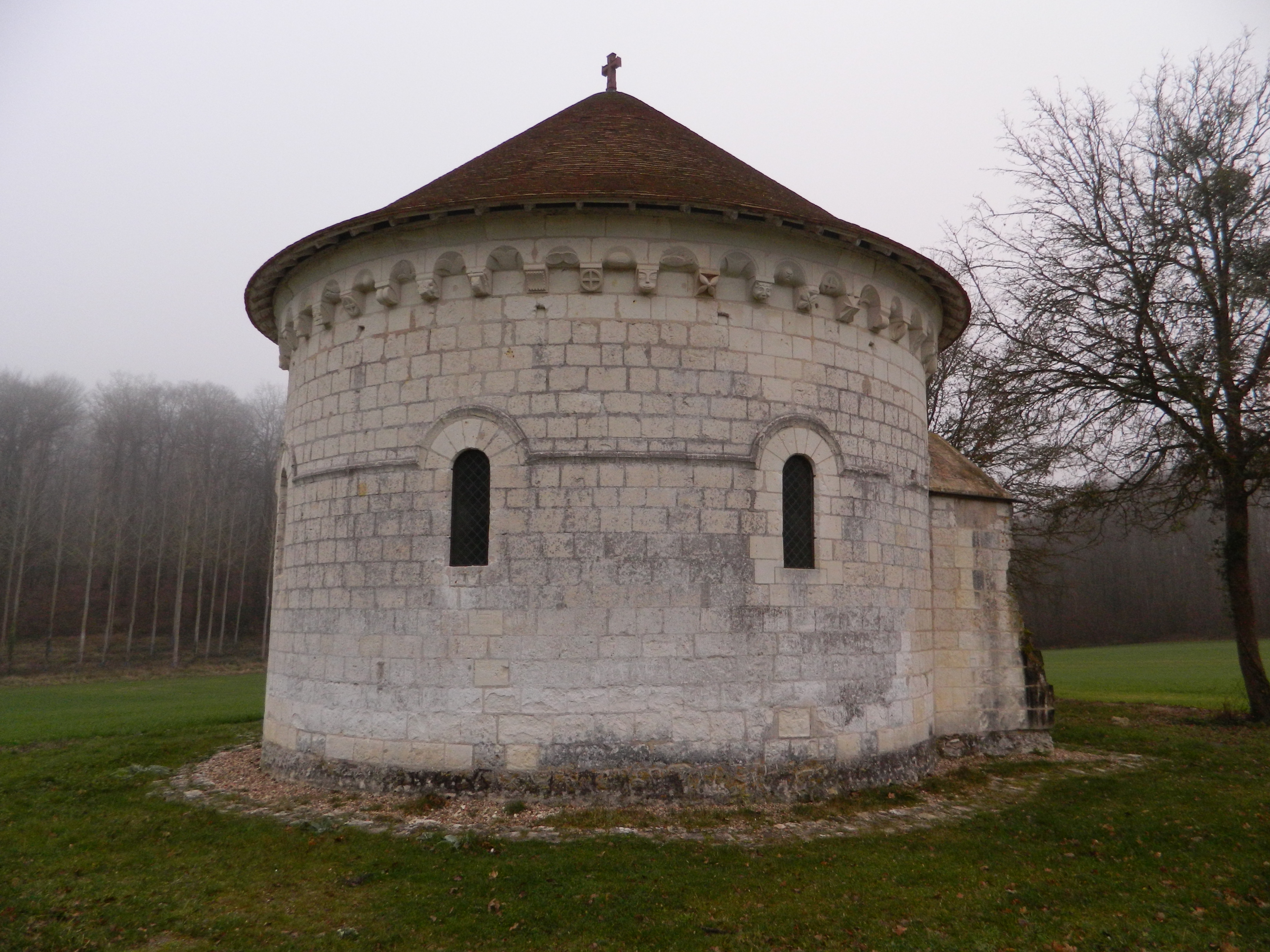 Chapelle Saint-Jean-du-Liget .